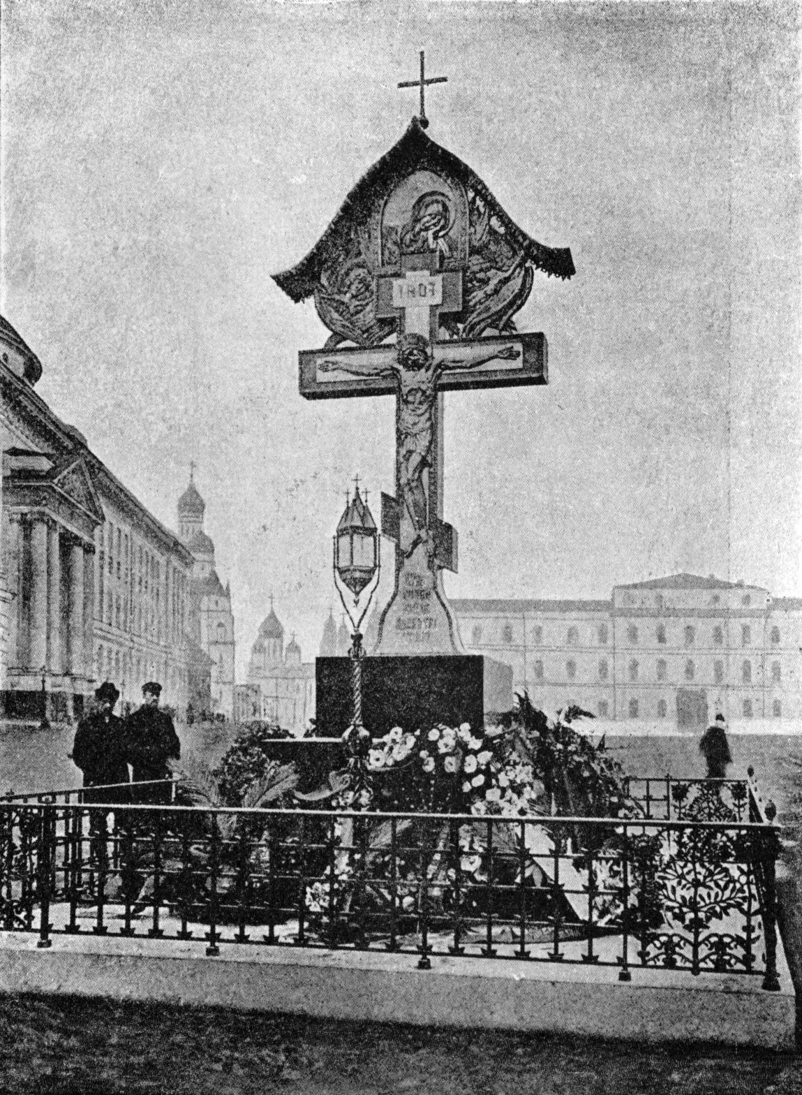 Памятник-крест, сооружённый на месте убийства Великого Князя Сергея Александровича на Сенатской площади в Кремле, освящённый 2 апреля 1908 года (по ст. стилю)